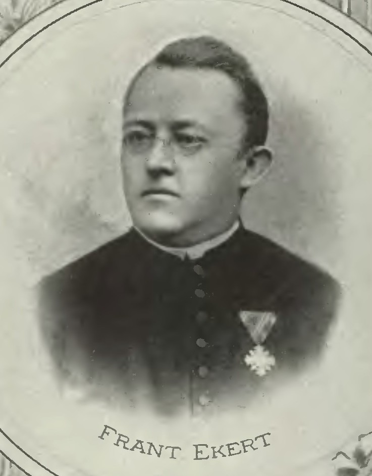 Portrét – František Ekert (1845-1902), Český katolický kněz a spisovatel.